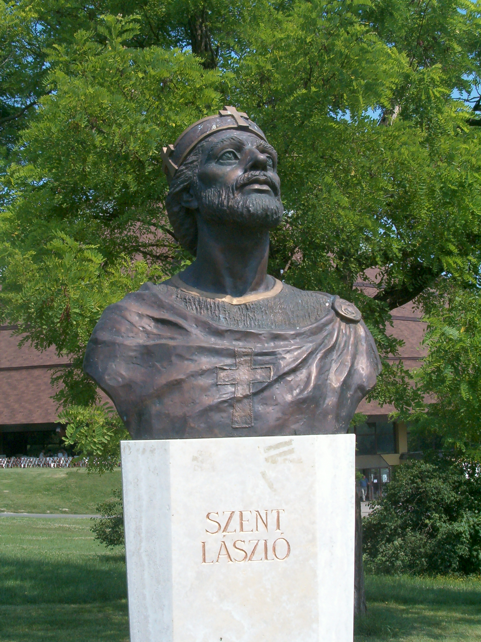 Szent László király Nemzeti Történeti Emlékpark / National Historical Memorial Park in Ópusztaszer, Hungary (Gera Katalin alkotása) self shot photo (2005), Váradi Zsolt